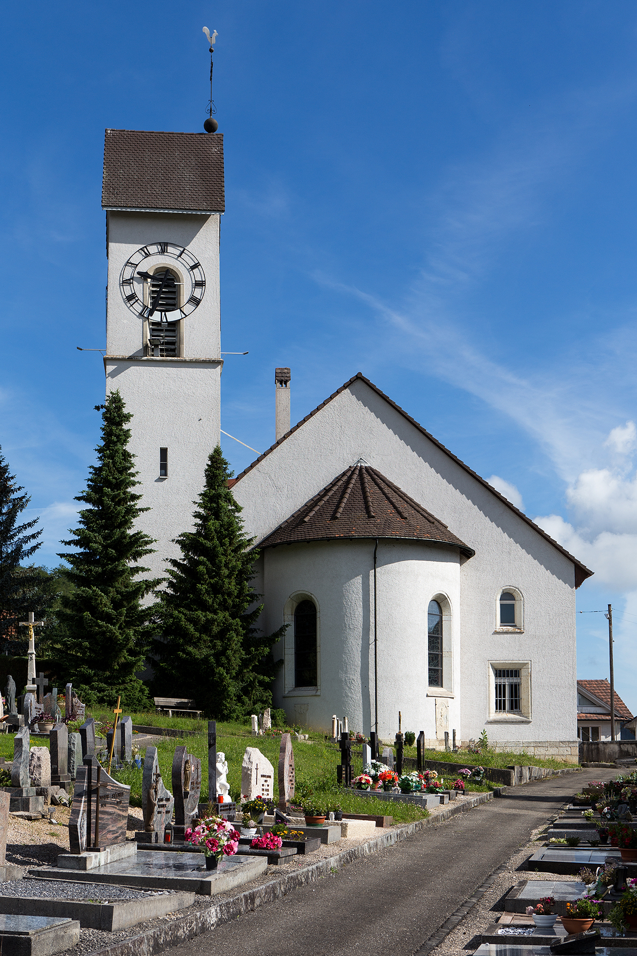 Eglise de CourtemaÎche (JU)